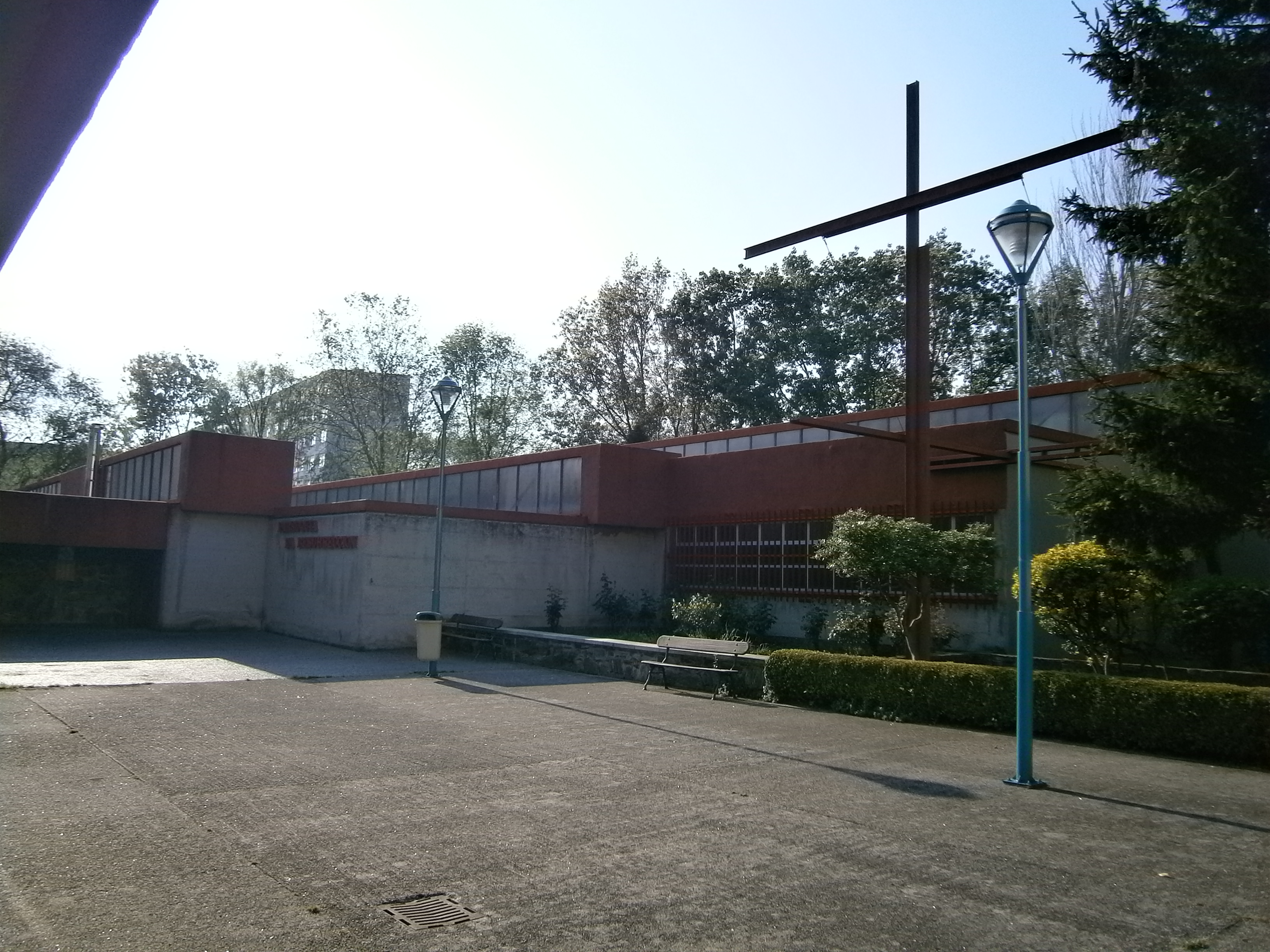 Parroquia da Resurrección, no Barrio das Flores (A Coruña). Edificio de José Antonio Corrales